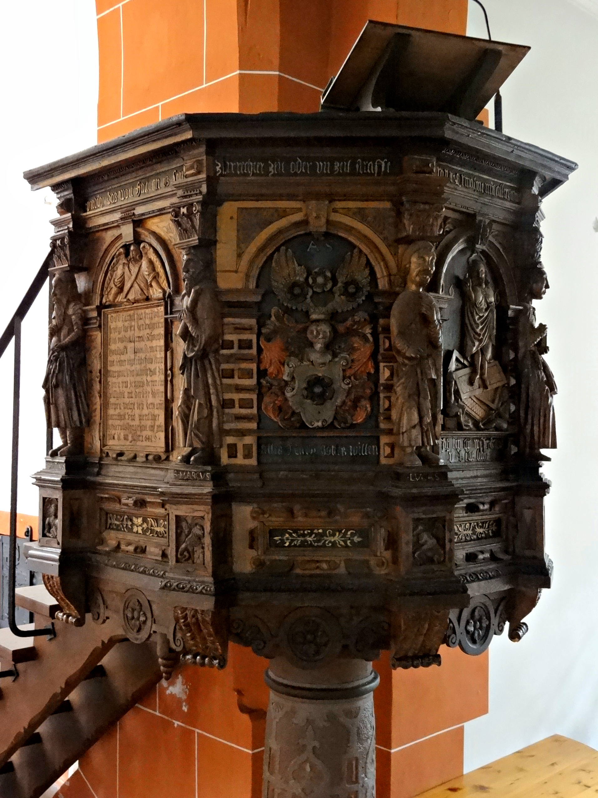 Stadtkirche zum Heiligen Geist (Nidda)